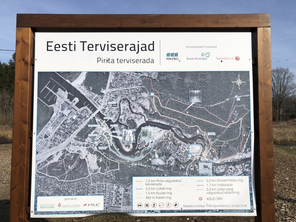 Lükati suusasilla ees asuv Pirita terviseradu kujutav kaart.